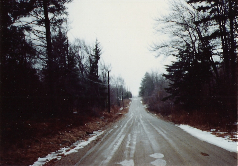 Bonny Lane, in Peru, Massachusetts.